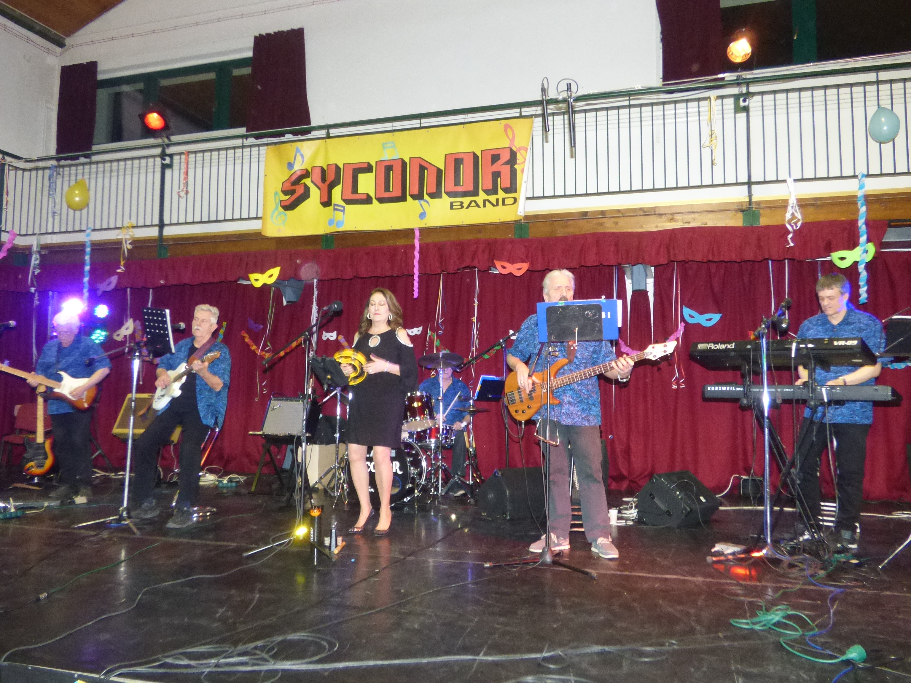 A Syconor együttes egy 2019 farsangi rendezvényen Pilisszentivánon [Dobos István (szólógitár), Hauer Rezső (dobok), Fábián Attila (ritmusgitár), Somlai Róbert (basszusgitár), Kosztolányi Attila (billentyűk), Catherine Conley Jakobs (ének)]